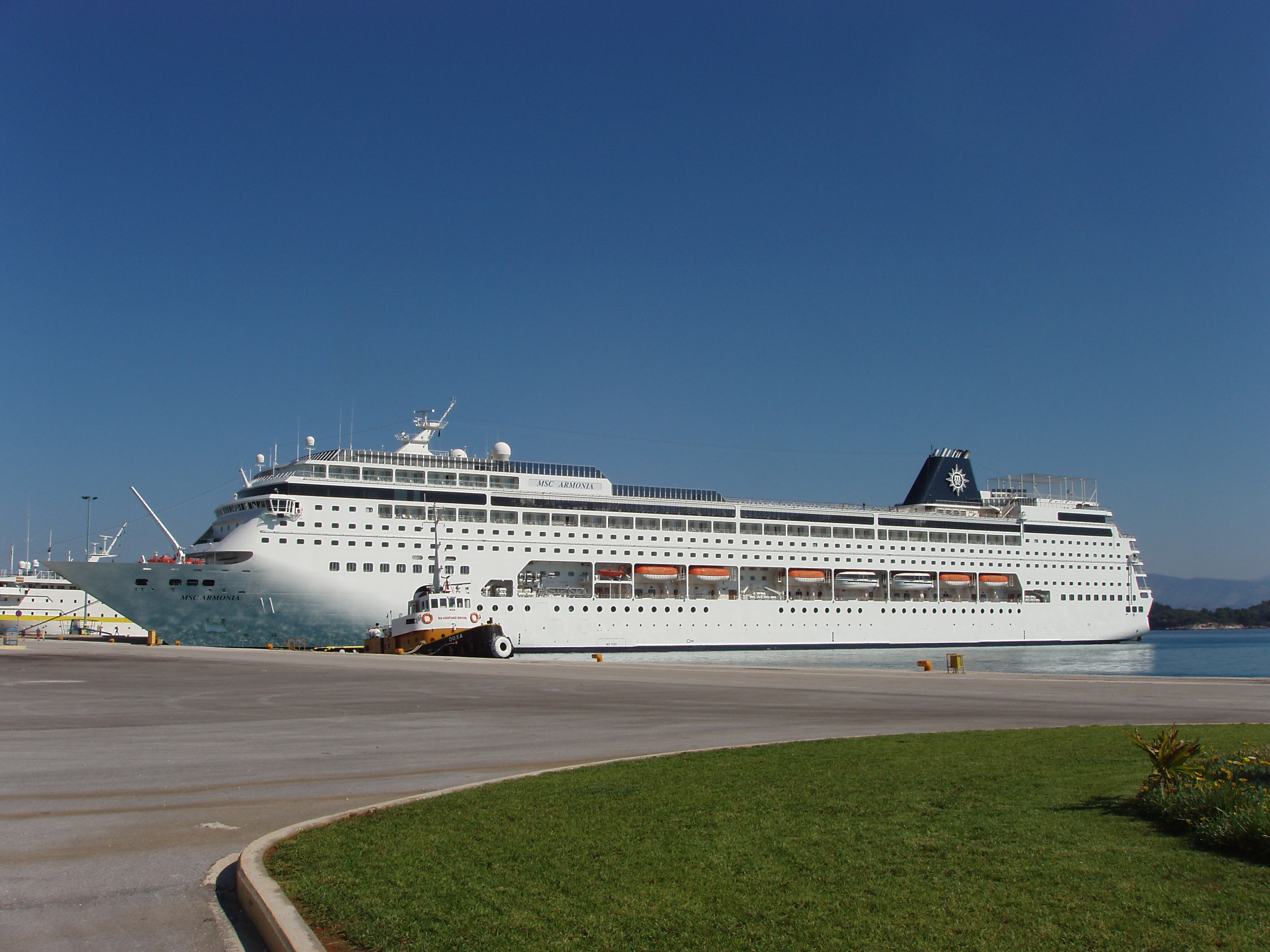 MSC Armonia